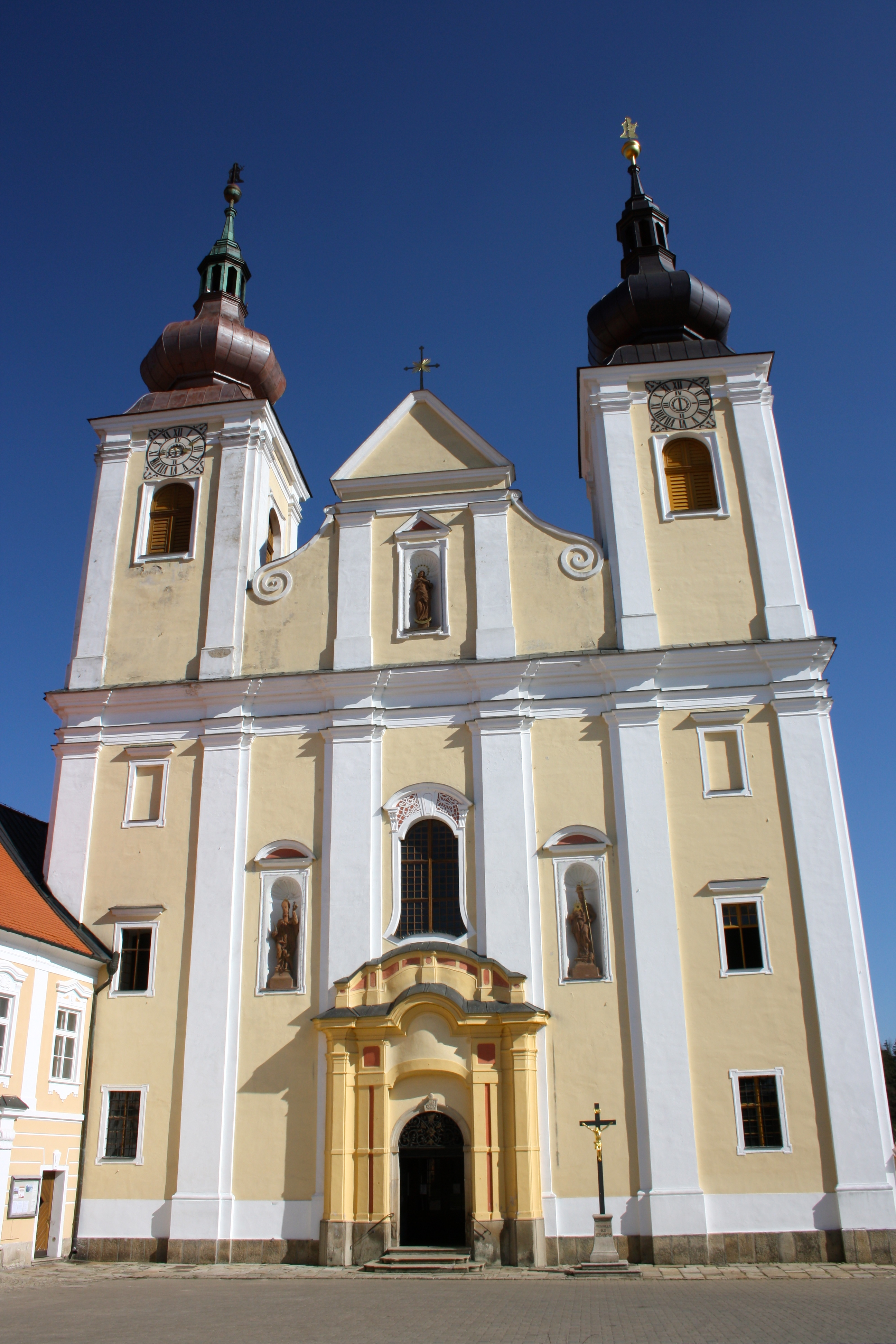 Klášter premonstrátský (Nová Říše), Nová Říše 1